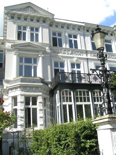 Geschäftsstelle von inkultur, Haus der Hamburger Volksbühne, Graumannsweg 31, 22087 Hamburg